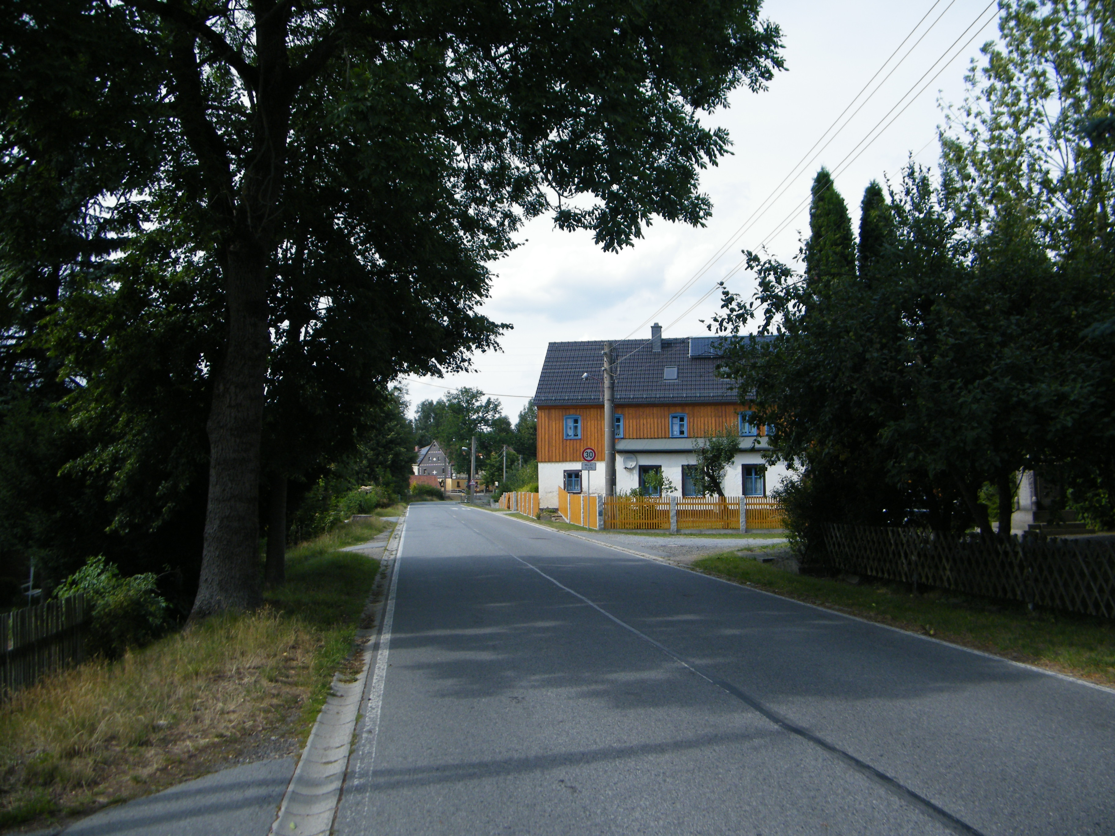 Berthelsdorf